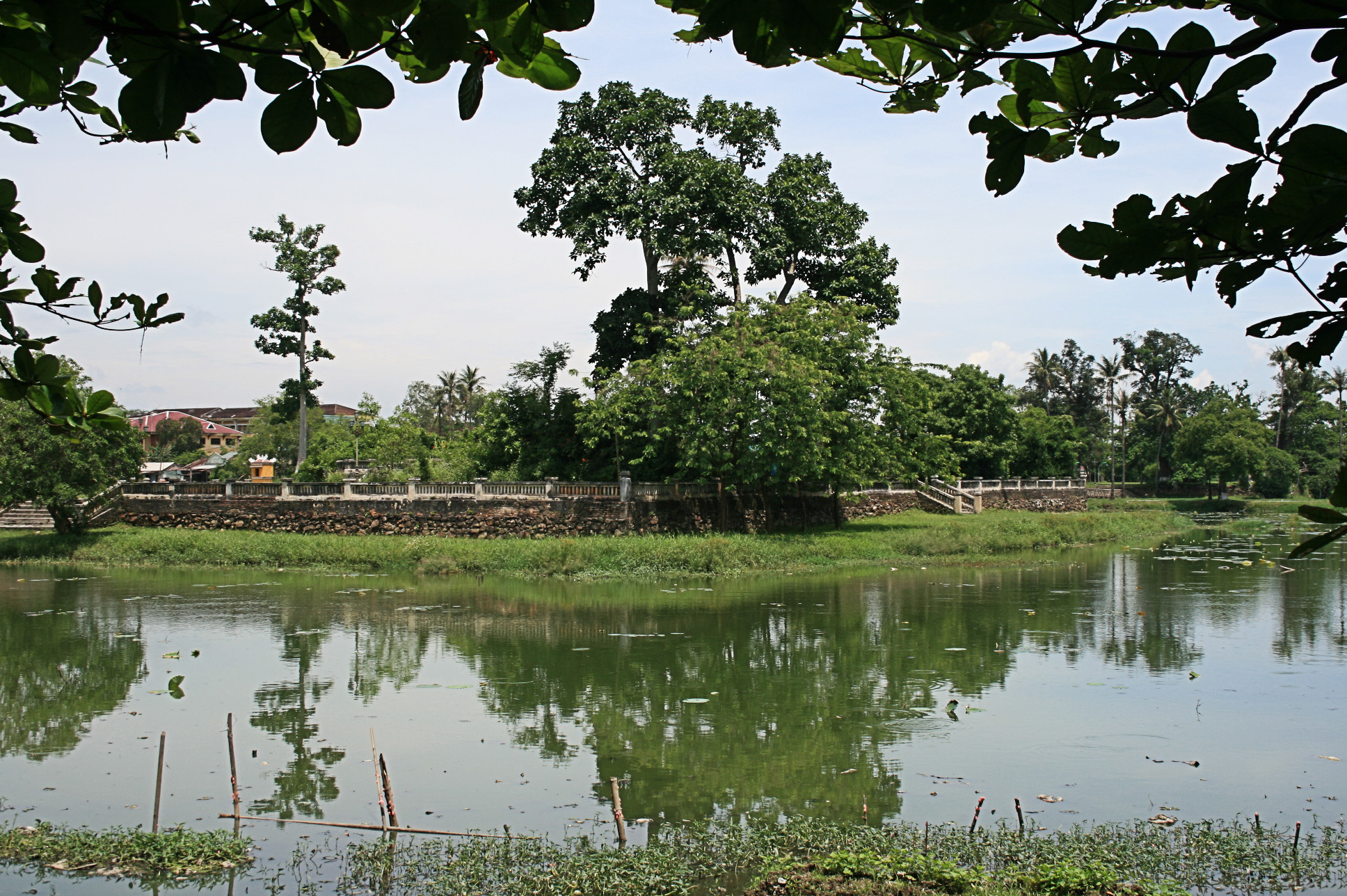 Hồ Tịnh Tâm và đảo Bồng Lai